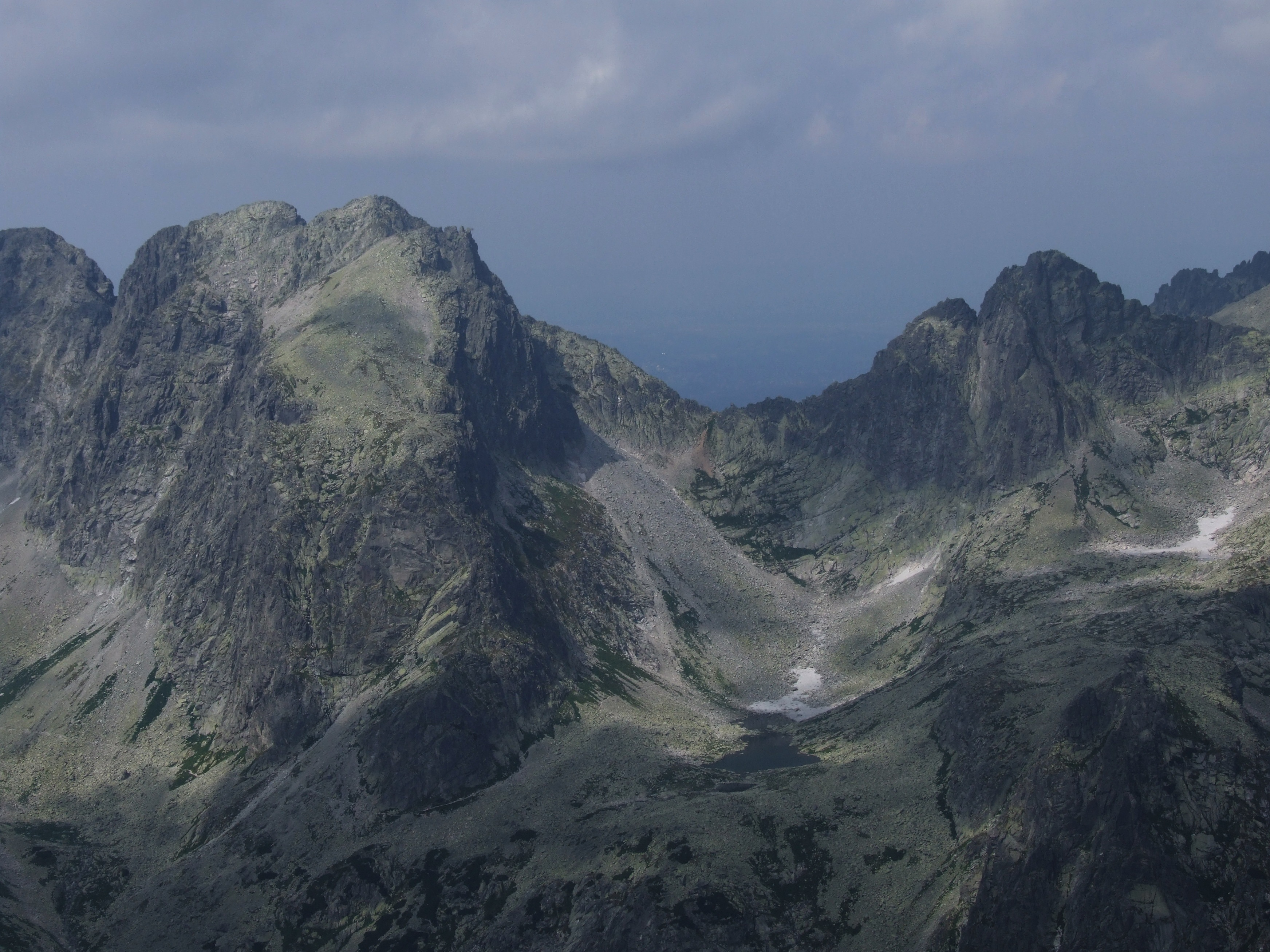 Jaworowy Wierch i Siwa Kotlina. Widok ze Sławkowskiego Szczytu.